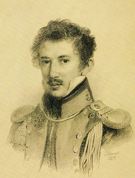 Михаил Сергеевич Лунин (29.12.1787 - 3.12.1845), декабрист.